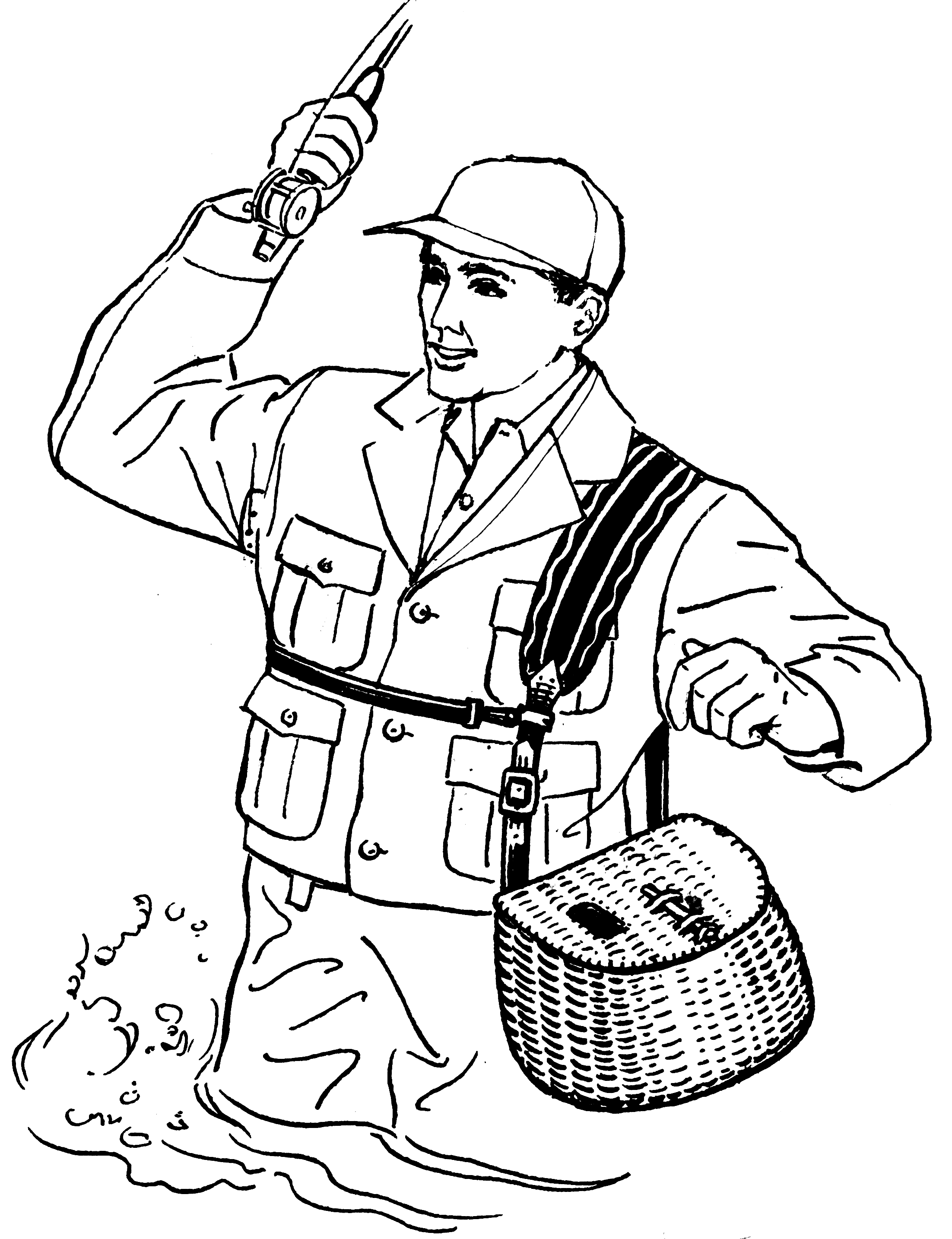 Creel